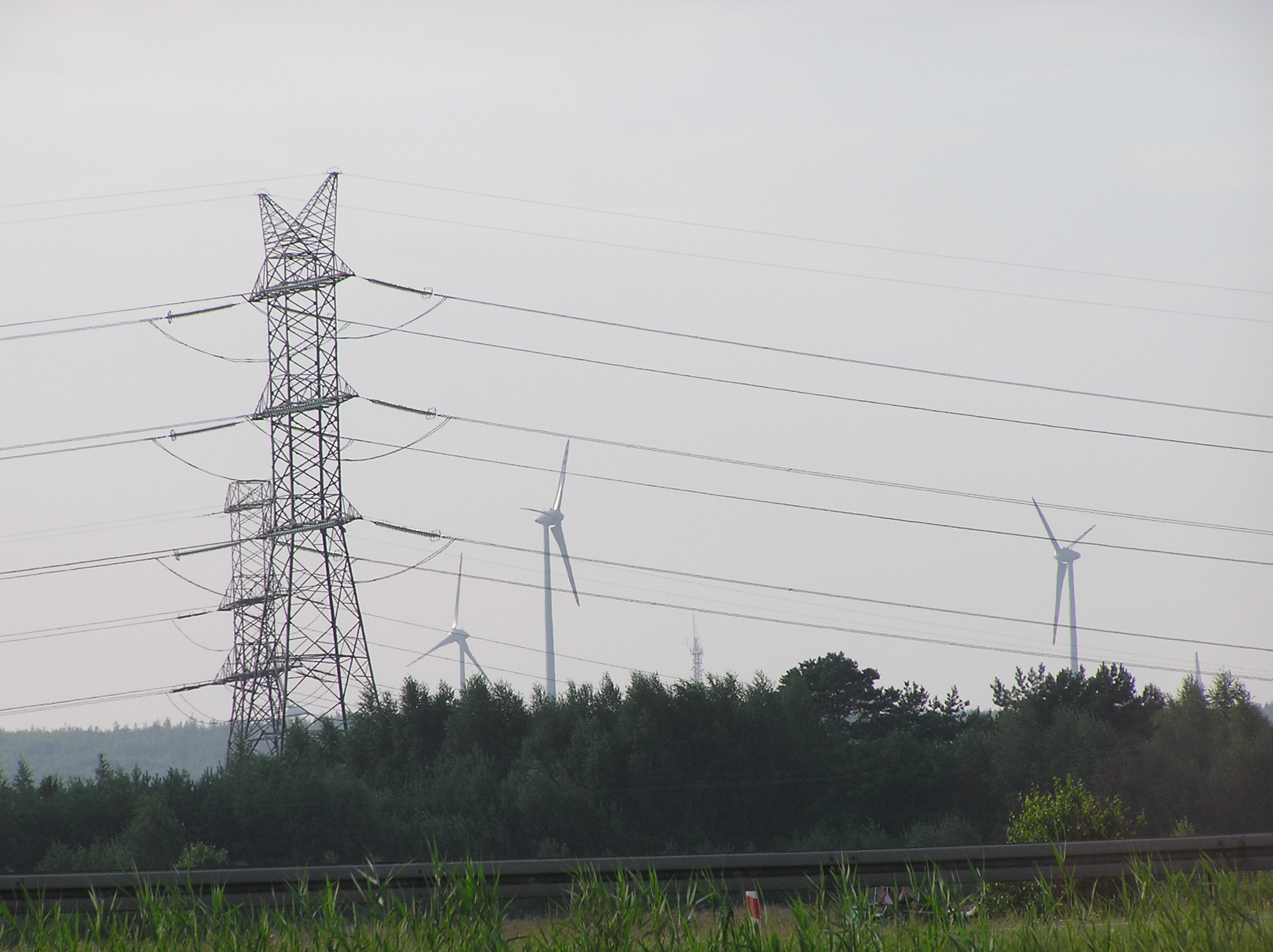 Elektrownia wiatrowa Kamieńsk, 15 x Enercon E-70, 30 MW.